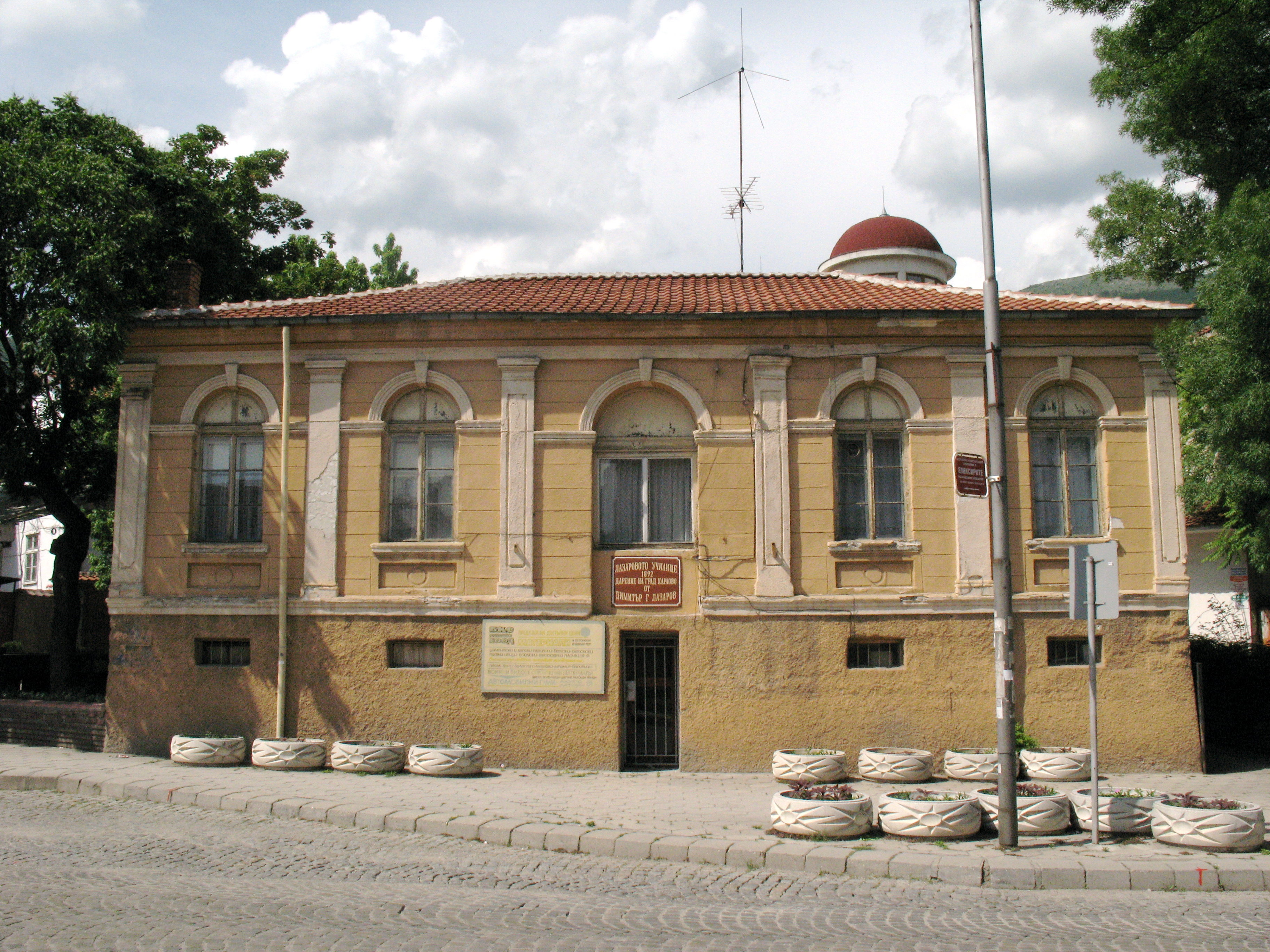 „Лазаровото училище 1892, ул. Генерал Карцов, Карлово“